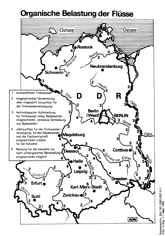 ADN-ZB Grafik 7.3.1990 Organische Belastung der Flüsse in der DDR- Die DDR verfügt ü-insgesamt 90.000 Kilometer Flüsse und Bäche. Davon werden jährlich 11.000 Kilometer nach ihrem Zustand klassifiziert. Dazu gehören alle großen und wichtigen Flüsse. 46 Prozent der 11.000 Kilometer sind durch ihre organische, hygienische und Salzbelastung nicht mehr für eine Badenutzung, nicht mehr für eine einfache Aufbereitung in der Industrie und schon gar nicht für die Trinkwasserversorgung geeignet.